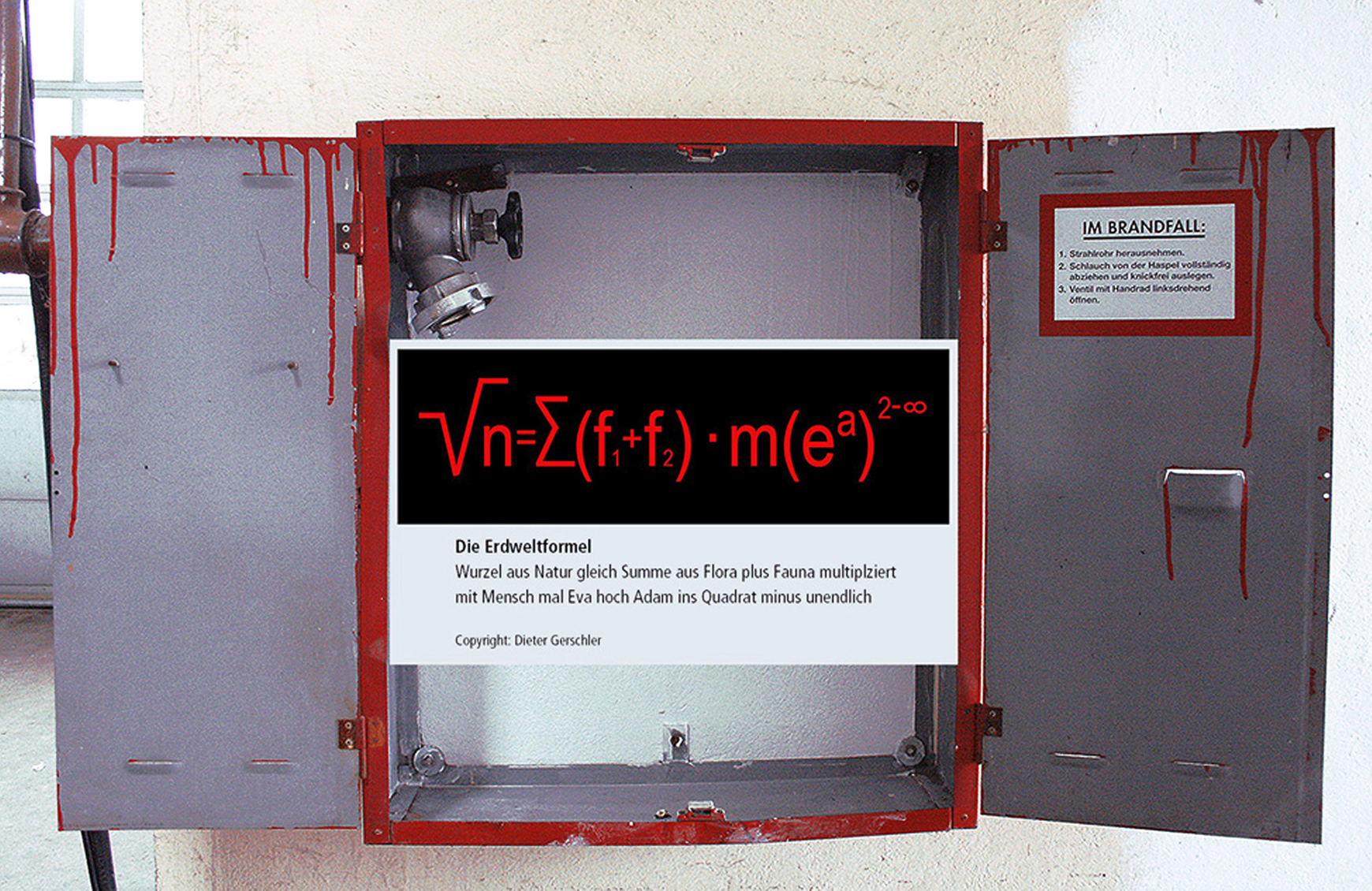 2013 - Installation im TGA-Gebäude Magdeburg, Fotografie von Dieter Gerschler